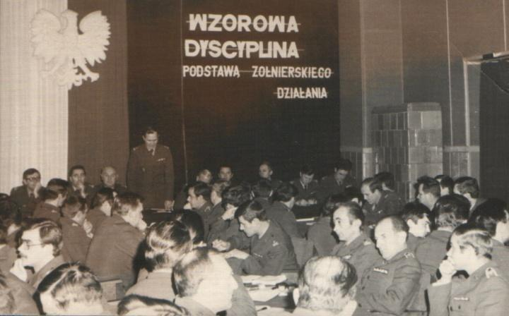 Przasnysz, 1980r. Odprawę roczną prowadzi dowódca mjr Marian Szklarek